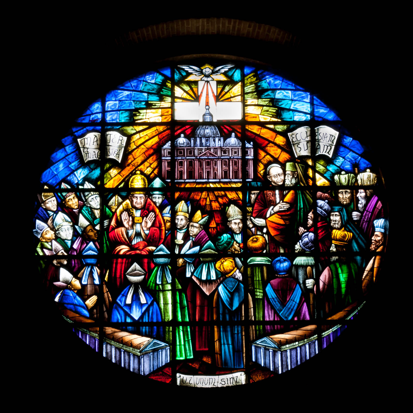 Chiesa nuova dei Santi Apostoli Pietro e Paolo di Sacconago This is a photo of a monument which is part of cultural heritage of Italy.